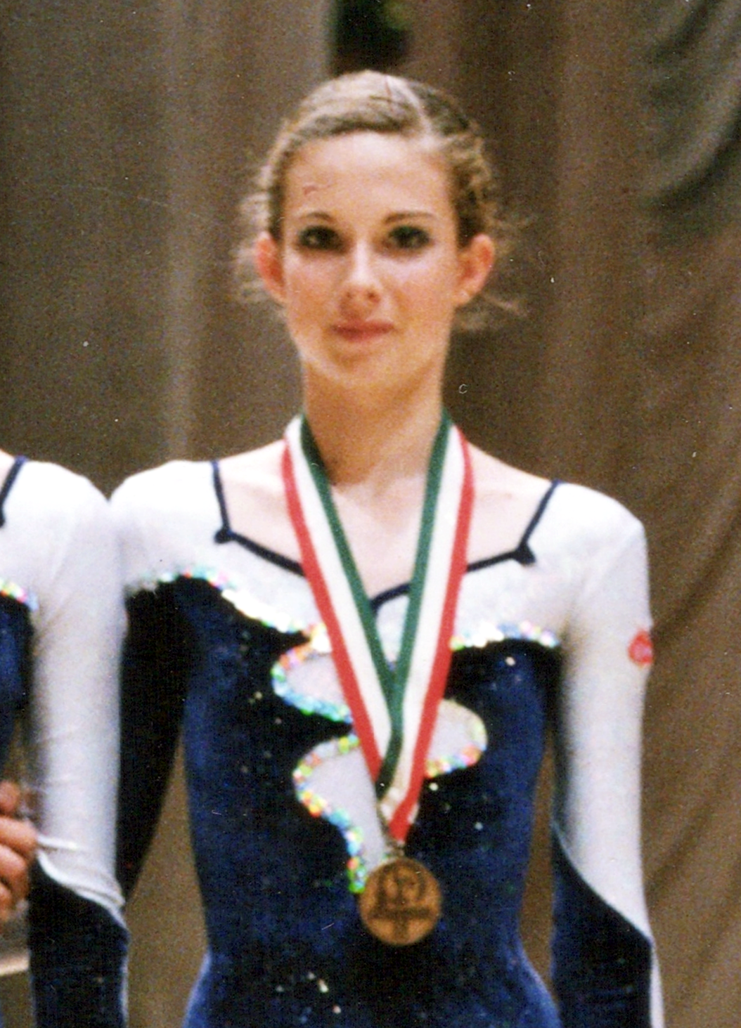 Carolina Malchair en 1999 con la medalla de bronce en el Europeo de Budapest.